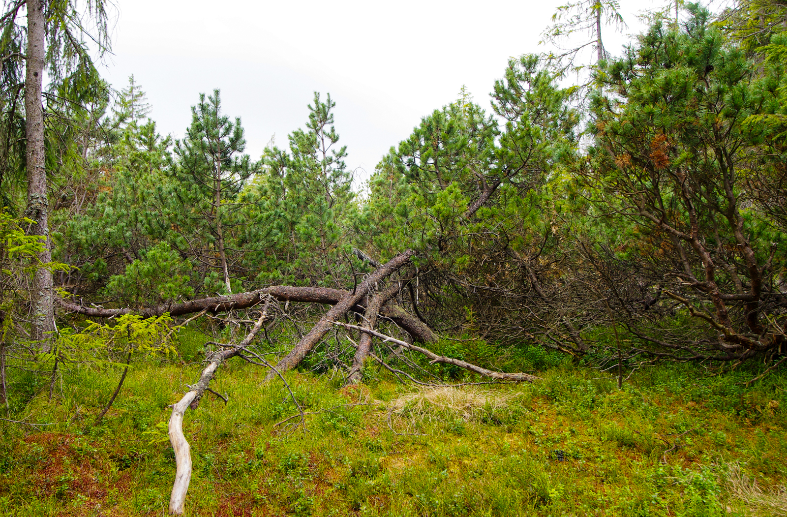 Přírodní památka Rašeliniště Haar v Přírodním parku Přebuz, okres Sokolov